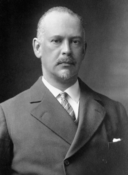 Голицын Борис Борисович — физик, сейсмолог, академик Российской Академии наук.